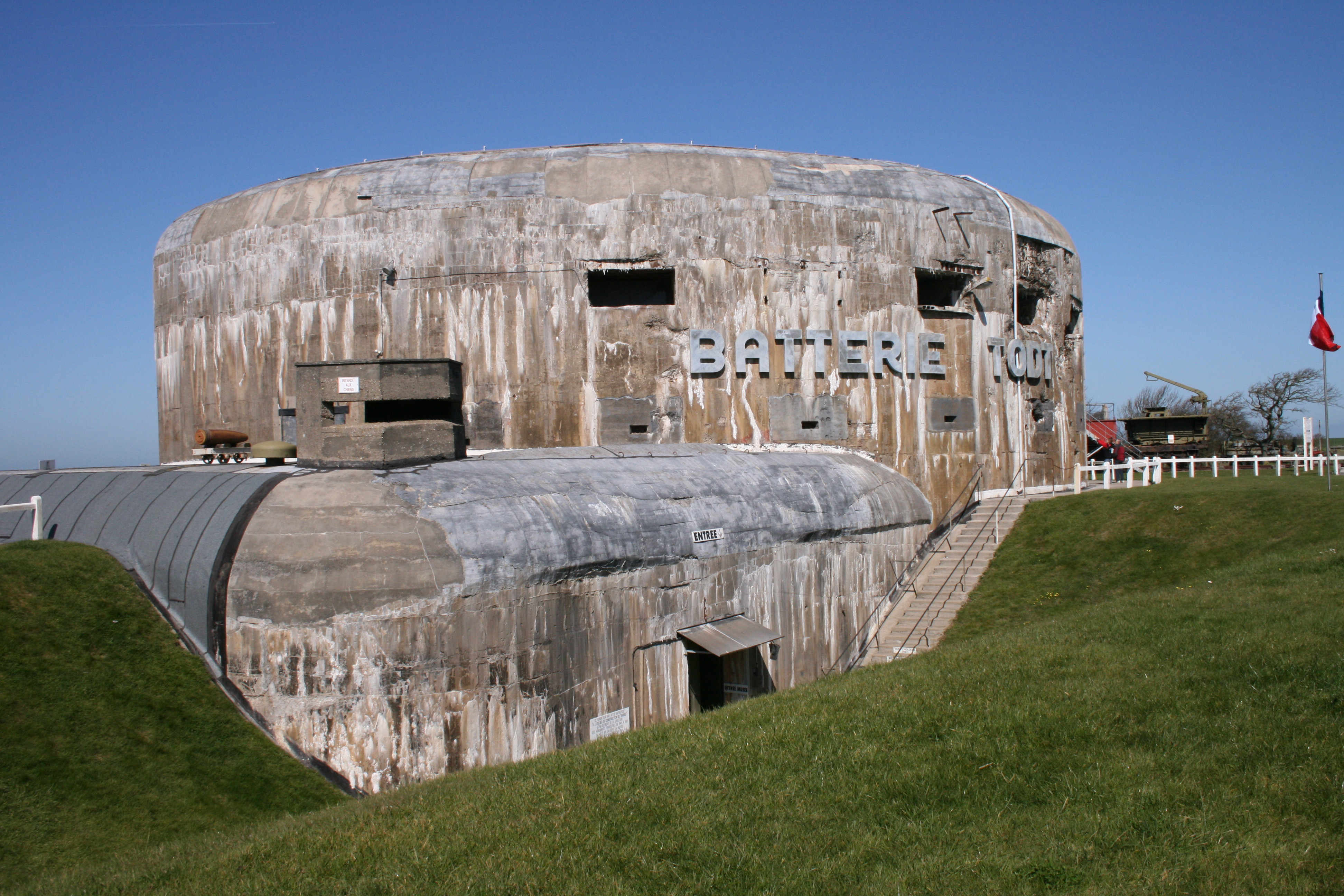 Atlantic Wall. Mur de l'Atlantique, Batterie Todt, commune d'Audinghen, département du Pas-de-Calais, France